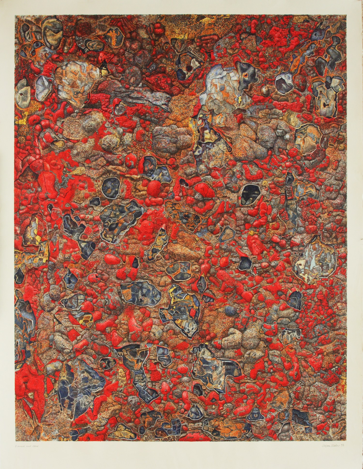 Bild Danach und davor (1993) von Stefan Kaiser